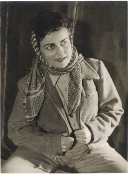 נחמה דוידית בתפקיד שוש בהצגה "בערבות הנגב"